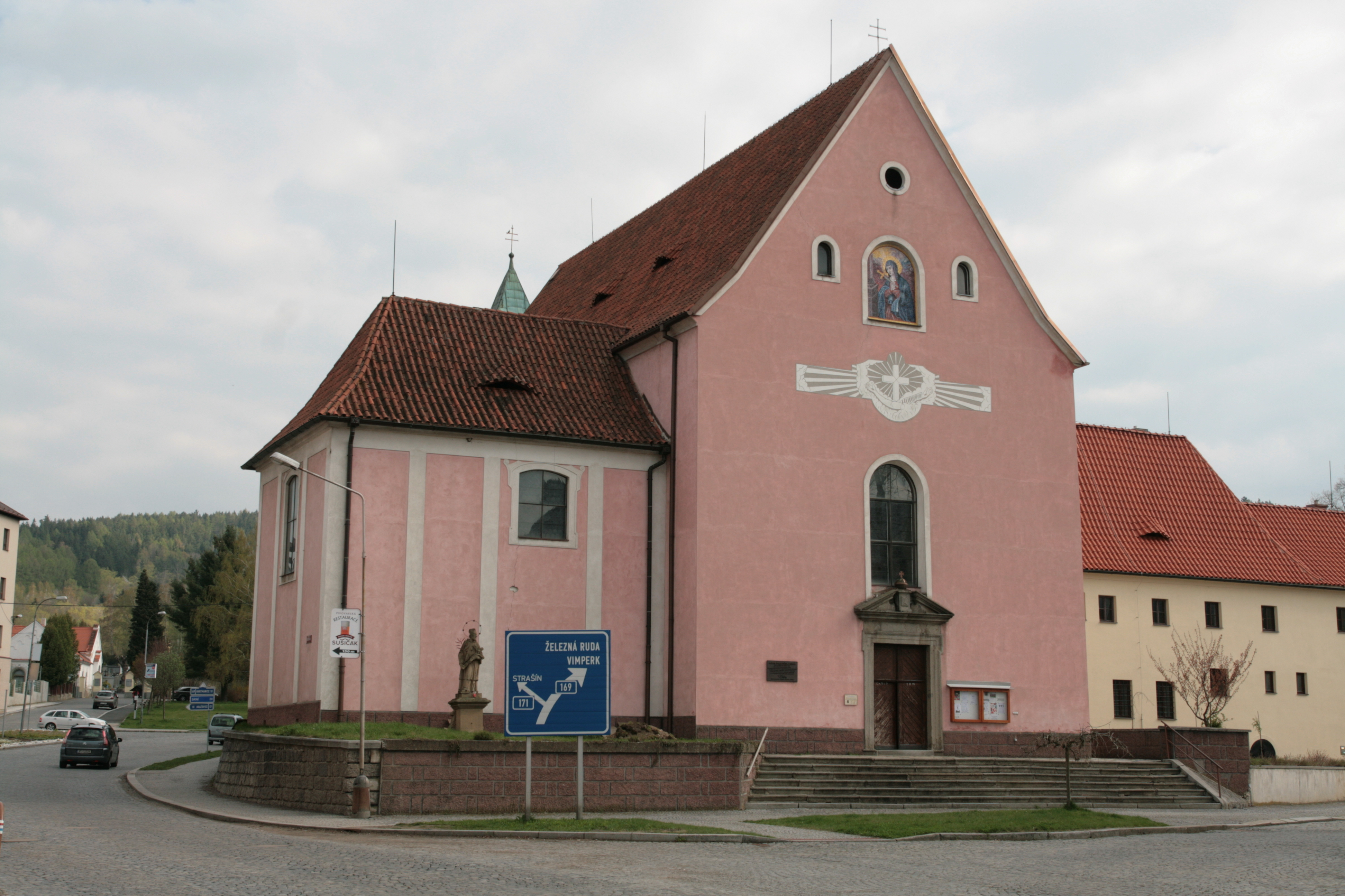 Město Sušice v okrese Klatovy. Kostel svatého Felixe za řekou Otavou v Dlouhoveské ulici s přilehlým kapucínským klášterem.